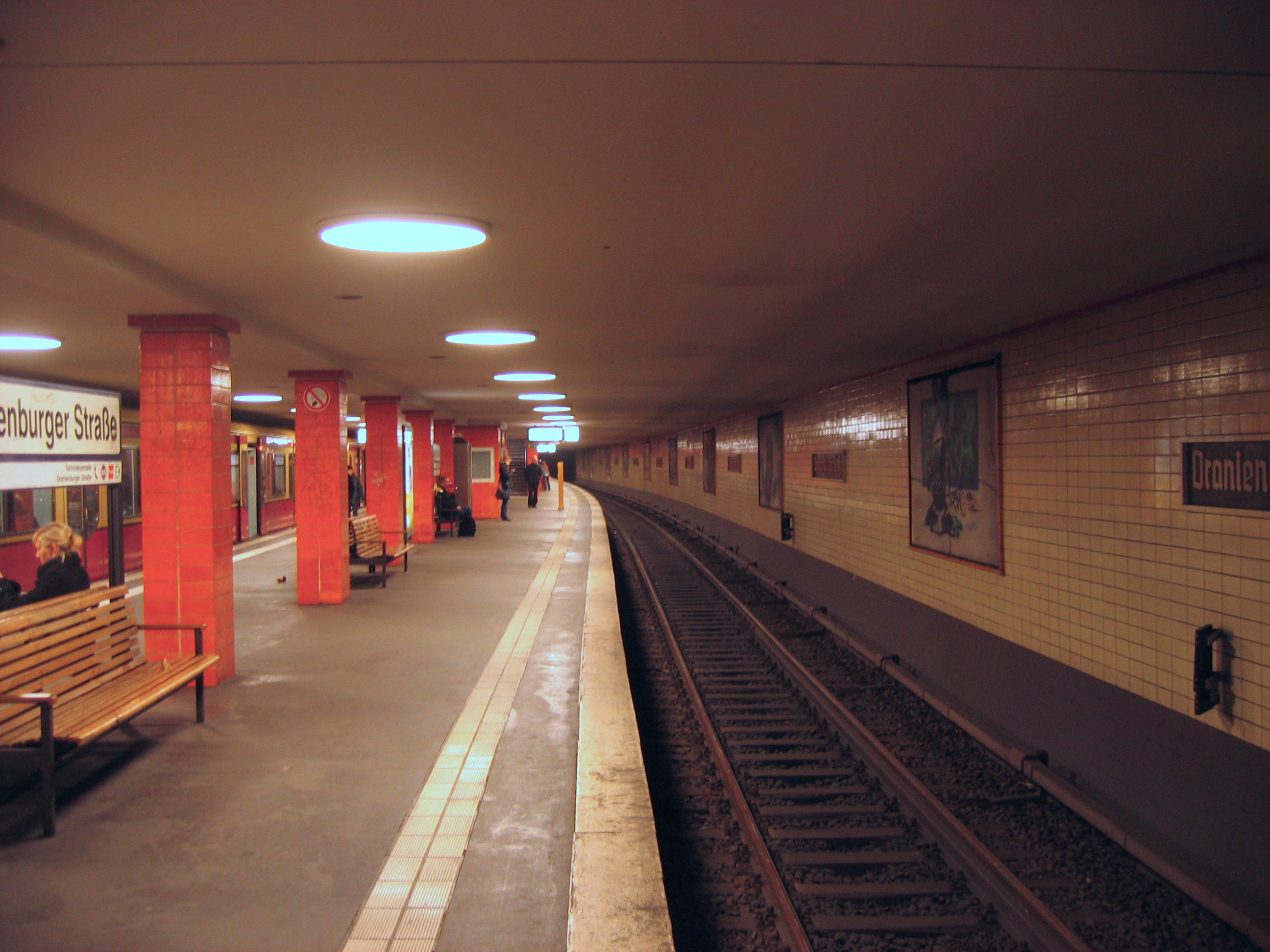 Der S-Bahnhof Oranienburger Straße in Berlin